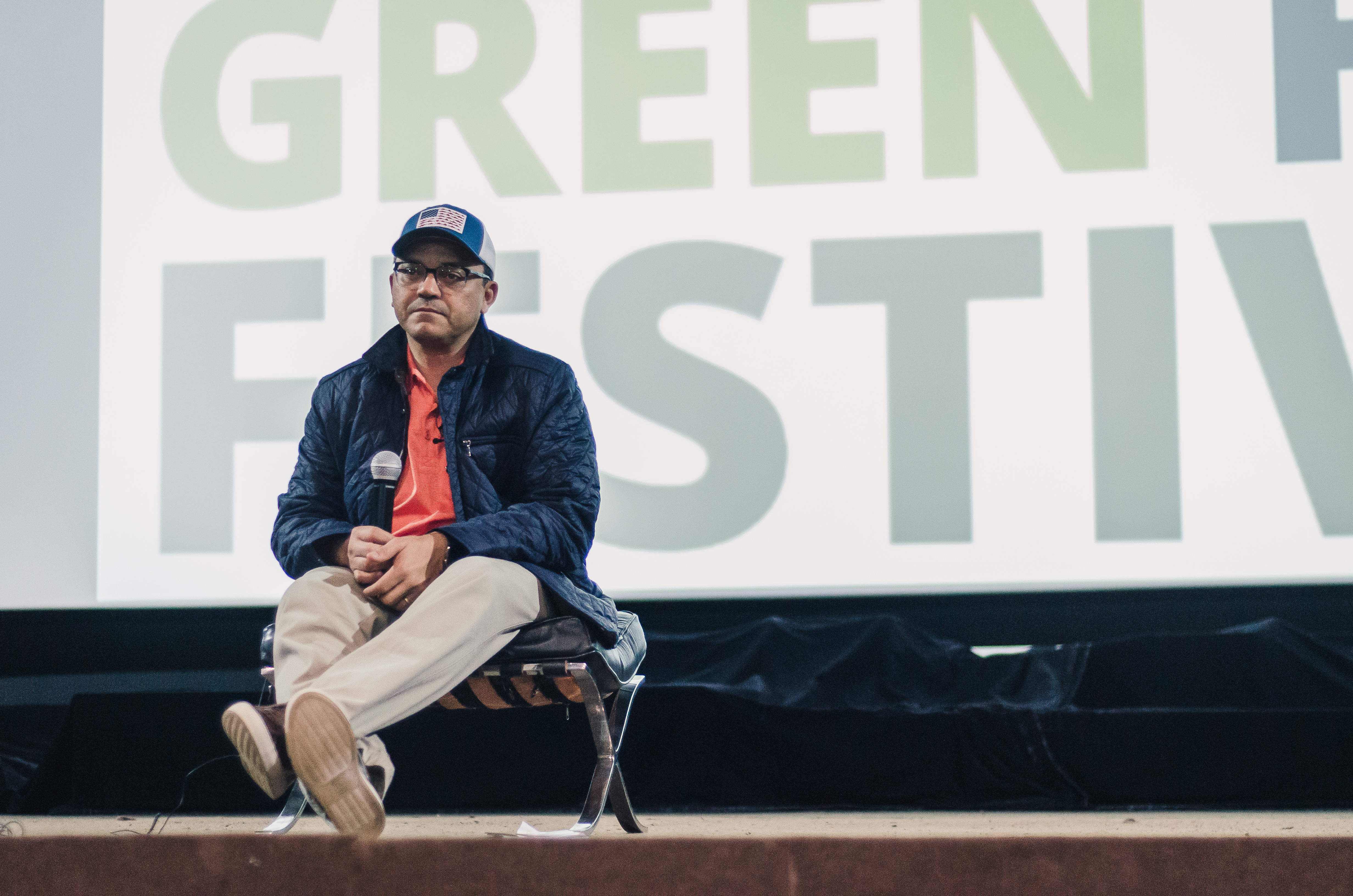 Diretor Marcos Colón durante debate sobre o filme Beyond Fordlândia na mostra Green Film do Fórum Mundial da Água